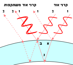 דיאגרמה מס. 2 מהערך בועת סבון בוויקיפדייה האנגלית, שתורגמה עבור הערך המקביל בעברית.